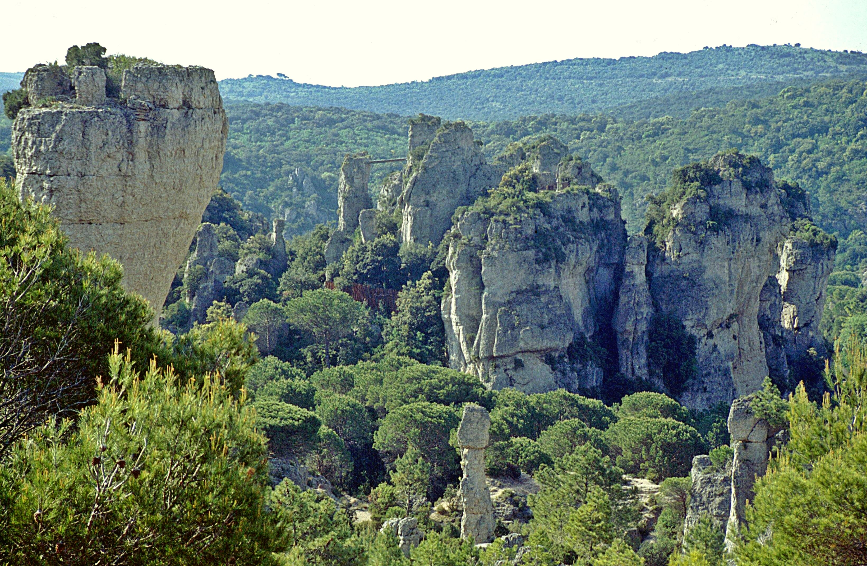 Cirque de Mourèze